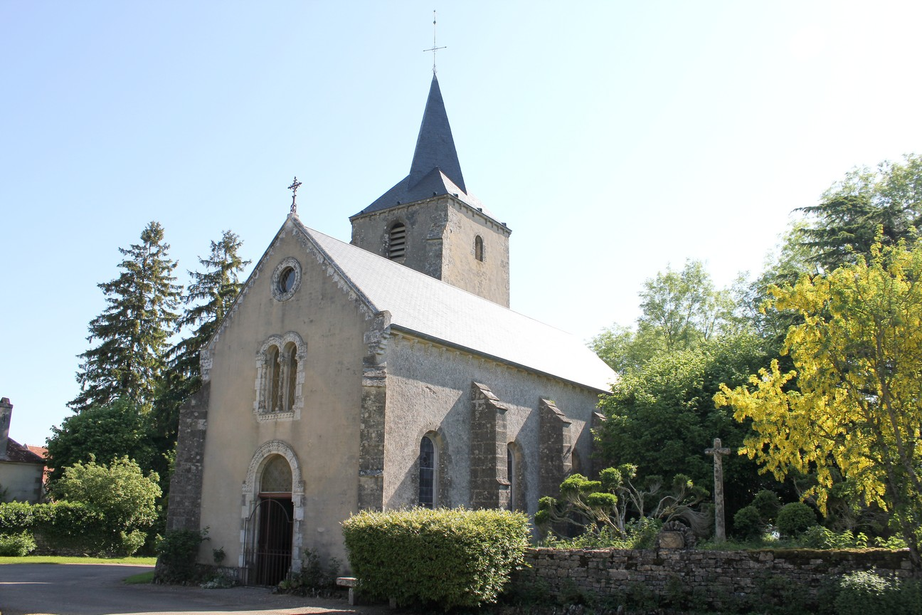 Église Saint-Sulpice d'Authiou